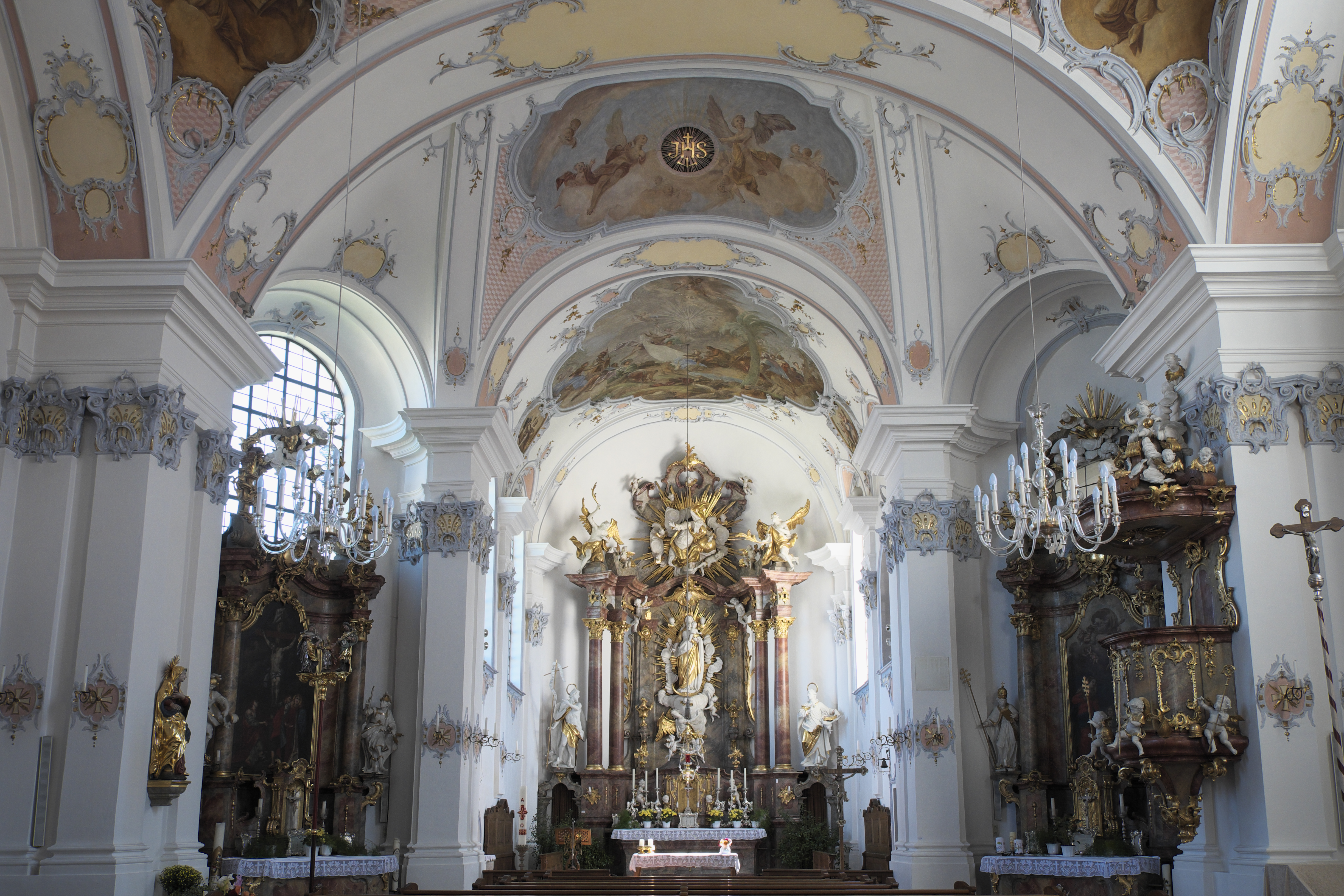 Katholische Pfarrkirche St. Johannes Baptist in Inning am Ammersee im Landkreis Starnberg (Bayern/Deutschland), Chor